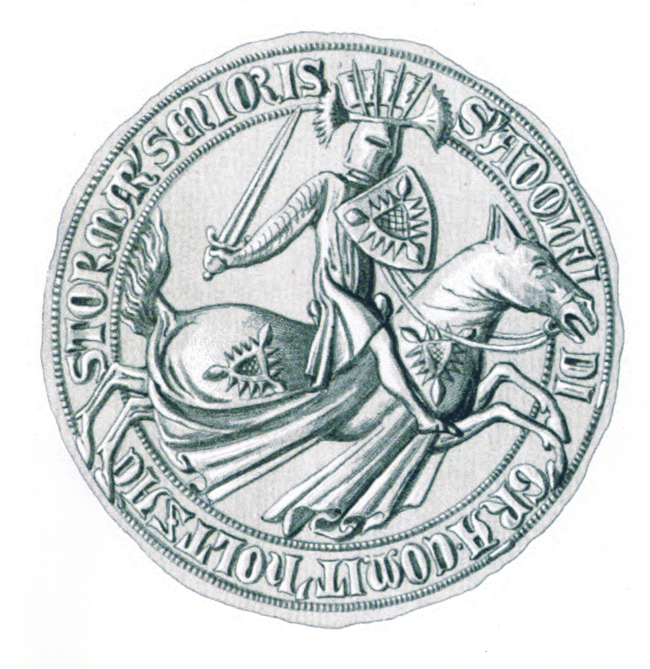 Siegel des Adolf IX., Sohn des Johann III., der Milde (* ca. 1297; † 27. September 1359),Graf von Holstein-Kiel (1316–1359) und Graf von Holstein-Plön (1350–1359) und der Mirizlava von Wittenburg. Das Siegel stammt aus der Zeit um 1365-1376.